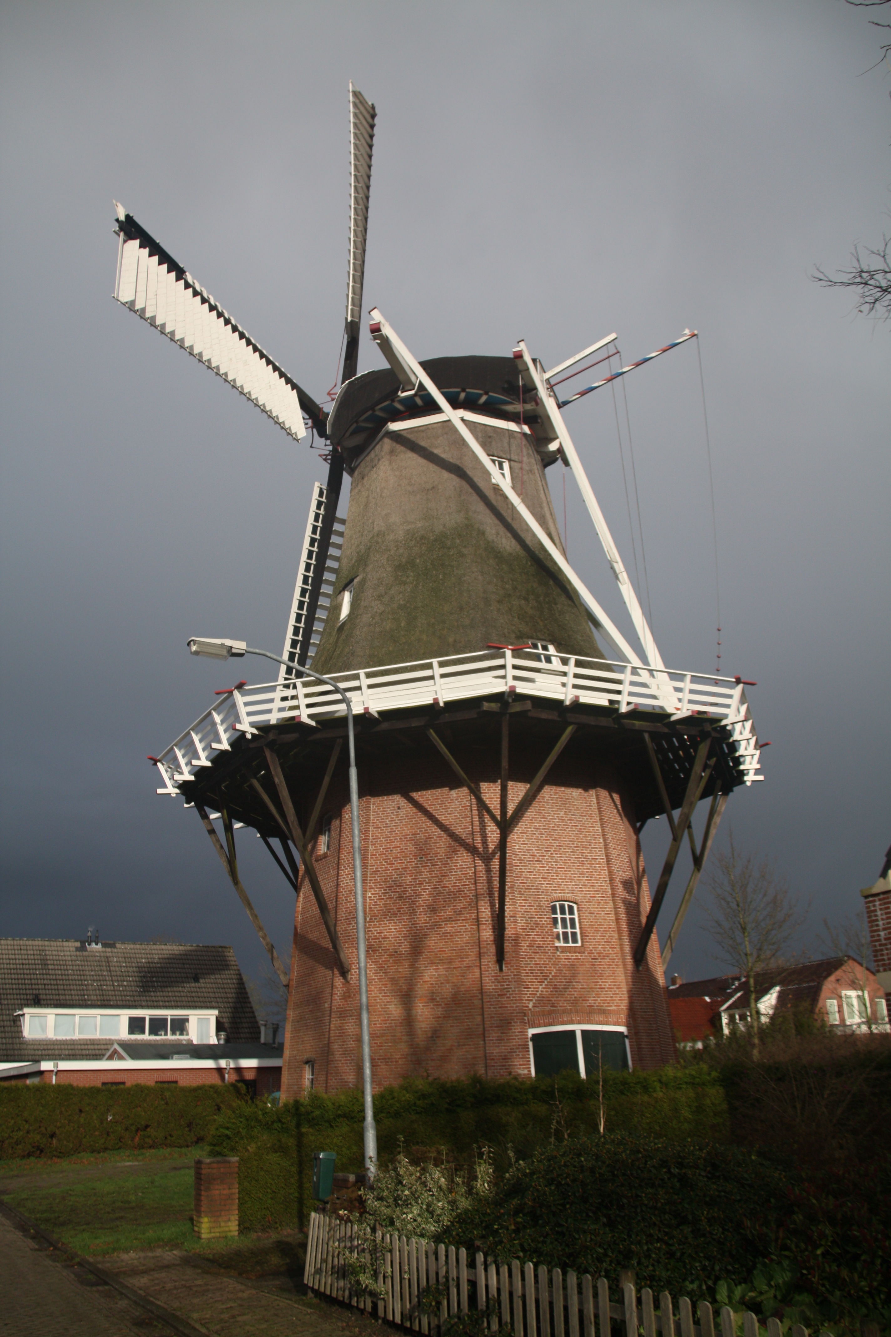 Paiser Meul